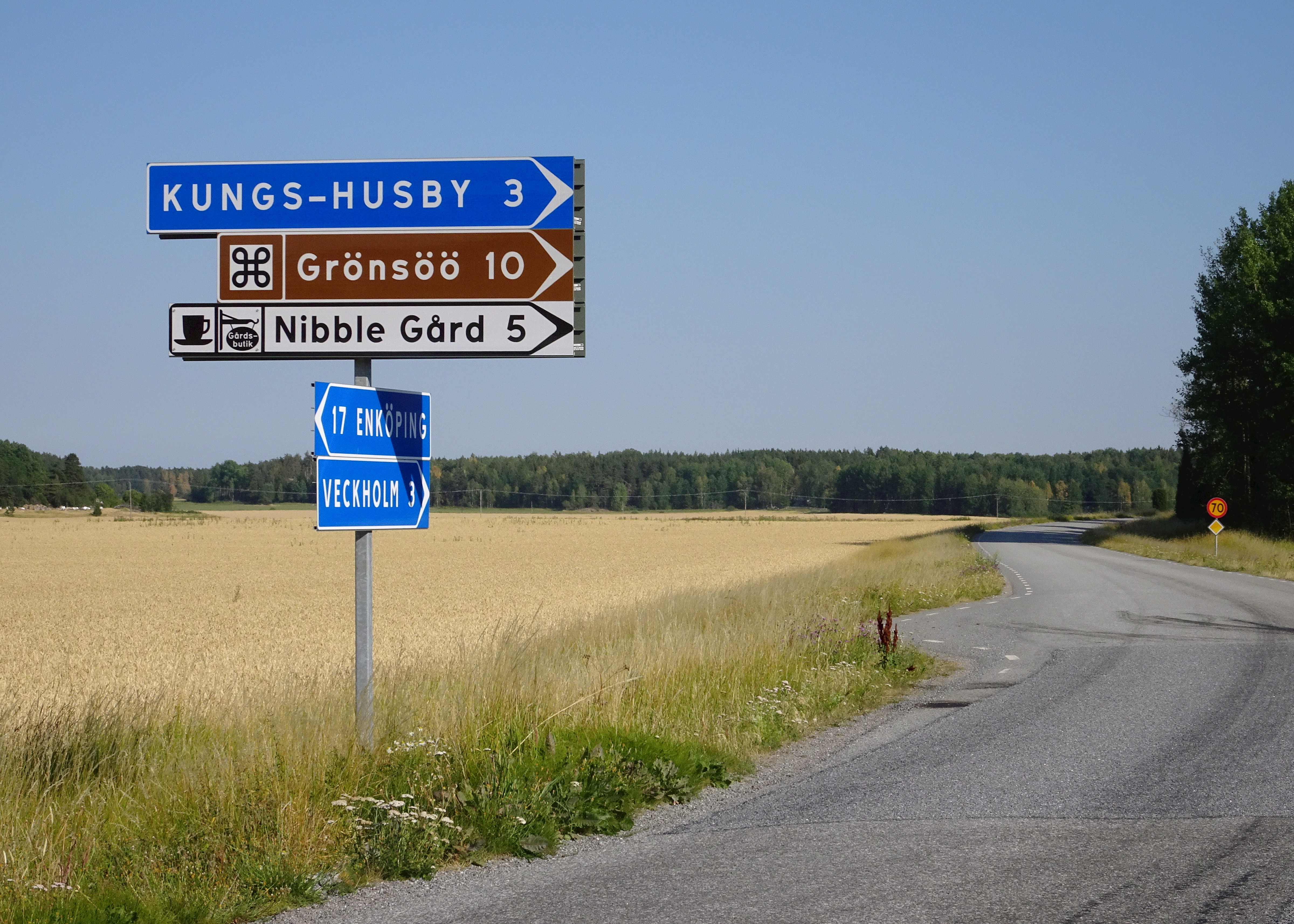 Grönsö slott, vägskylt